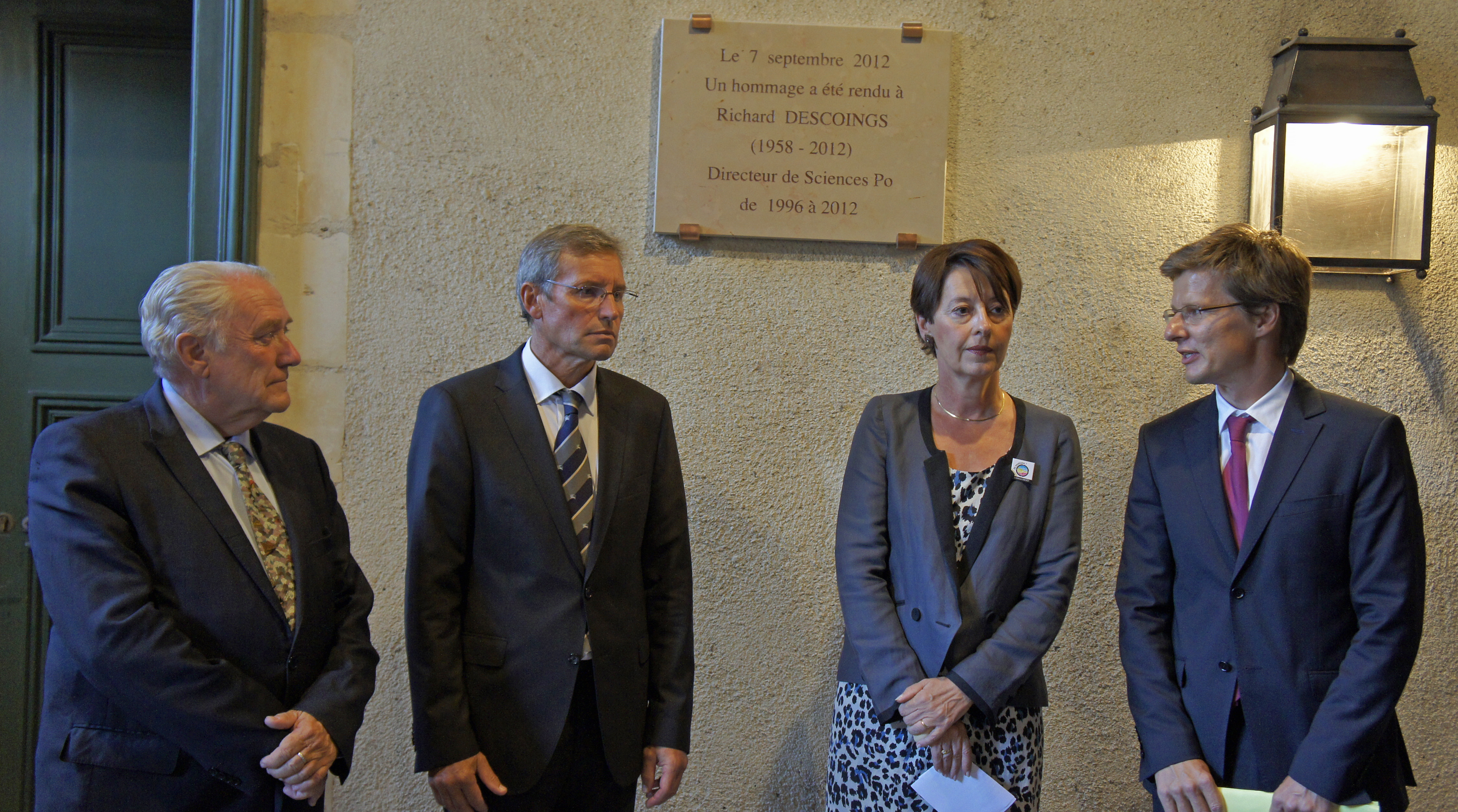 Inauguration d'une plaque en mémoire de Richard Descoings par Bachy_Savary_Hazan_Crès de gauche à droite. Cérémonie et plaque dans l'Ancien Collège des Jésuites de Reims.